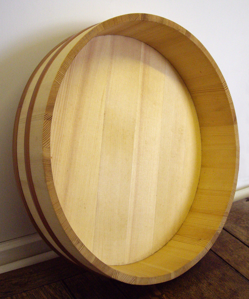 A hangiri